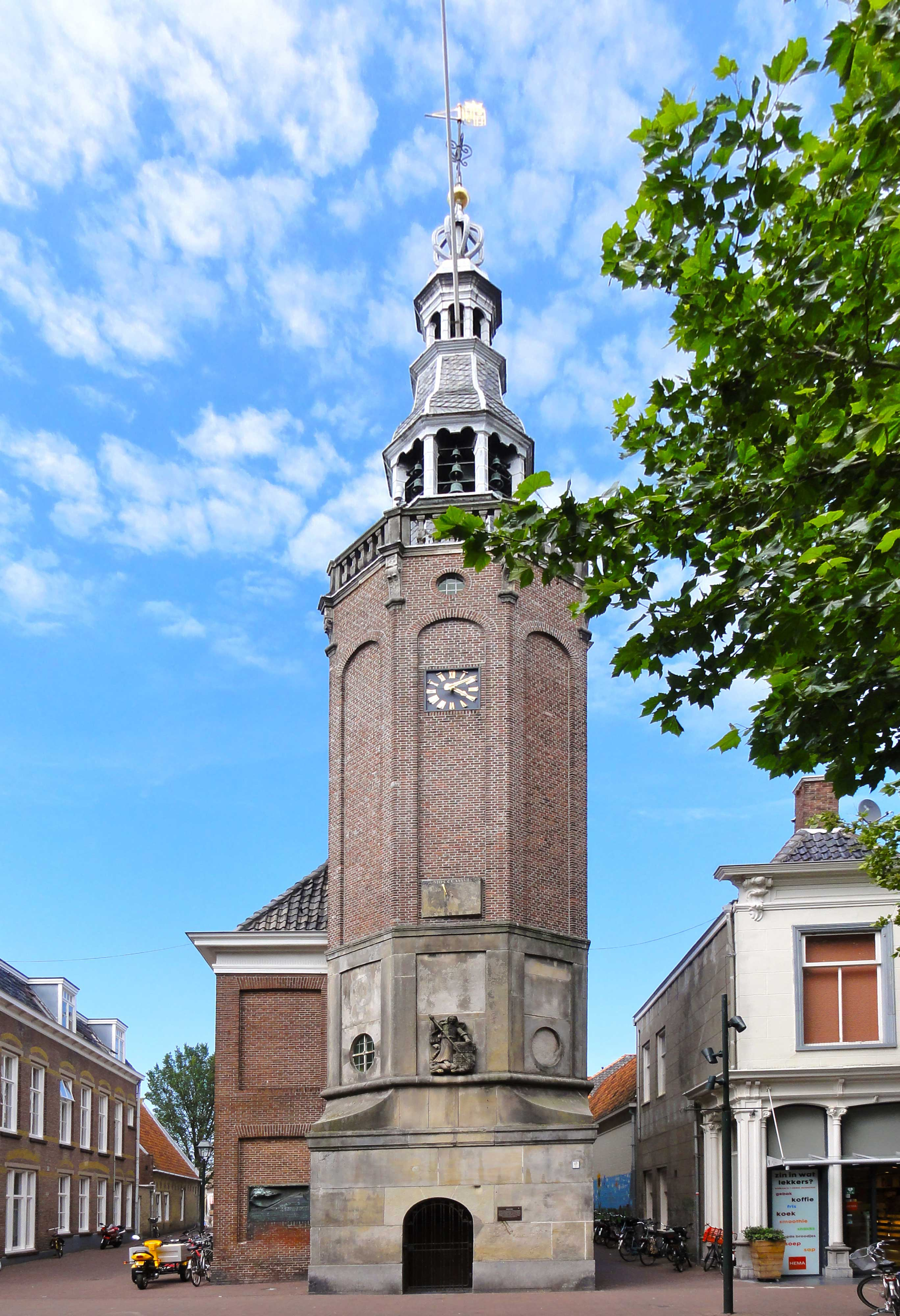 Raadhuistoren gezien vanaf de Voorstraat in Harlingen